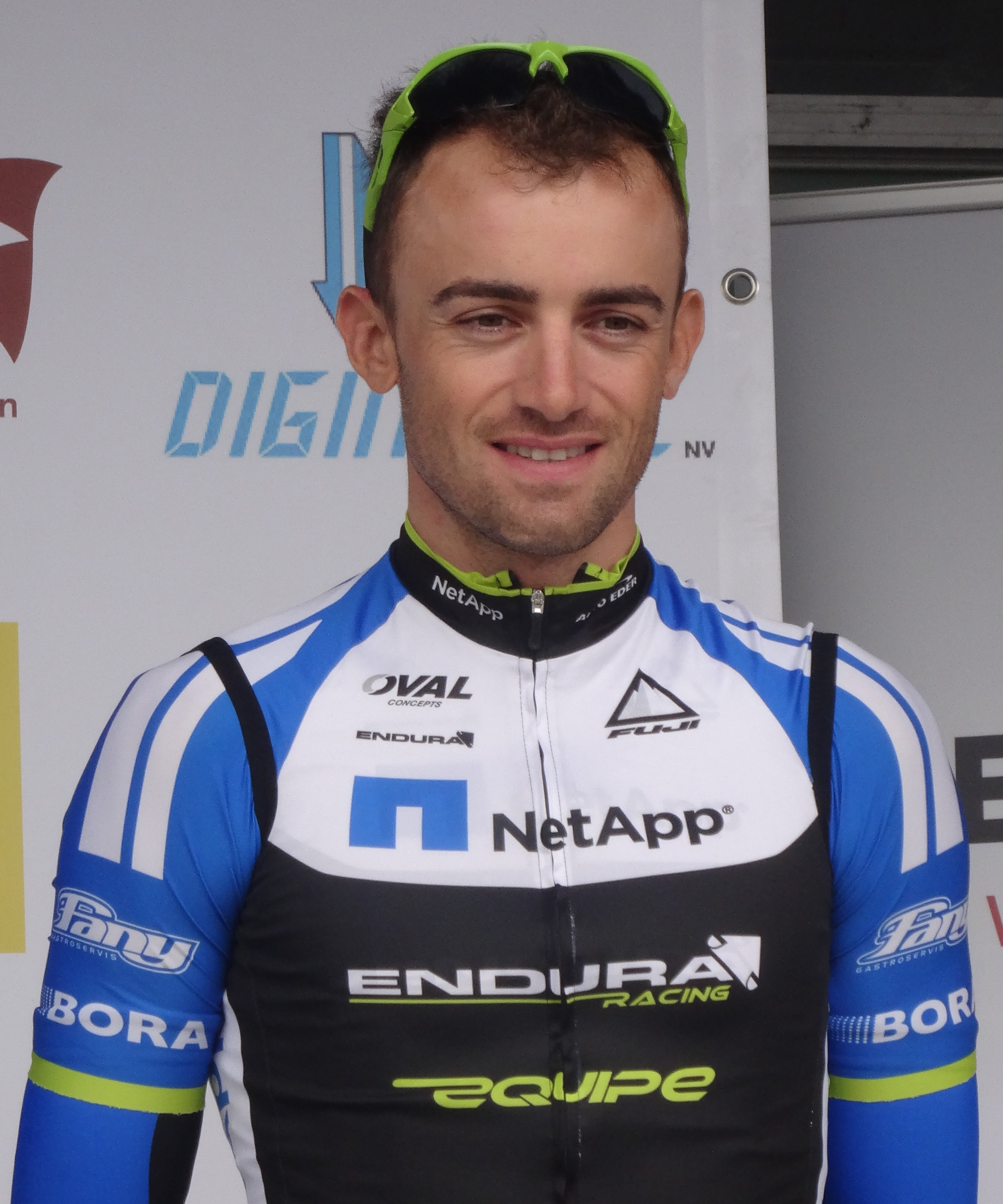 Reportage photographique réalisé le mercredi 24 septembre à l'occasion du départ et du début de la course du Circuit du Houtland 2014 à Lichtervelde, Belgique.